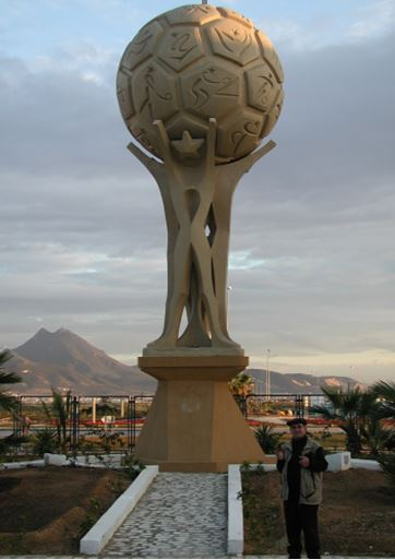 XIV mediterrane Spiele aus Polyester (10 meter) - 2001 Citee Olympique – Rades/Tunis